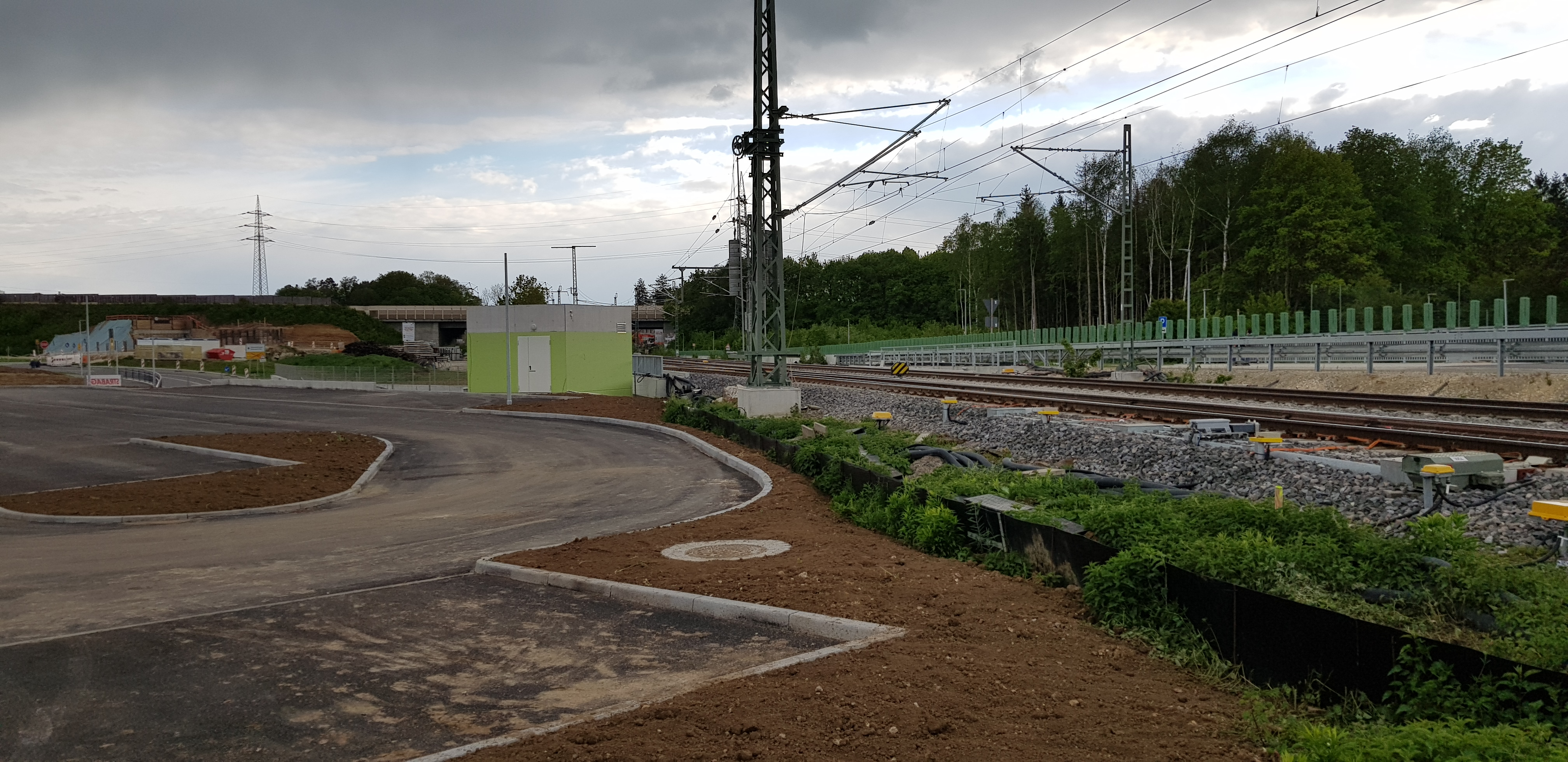 Eine Weiche und ein kurzes Stück Gleis markieren im Südkopf des Bahnhofs Wendlingen das zukünftige nördliche Ende der Güterzuganbindung.